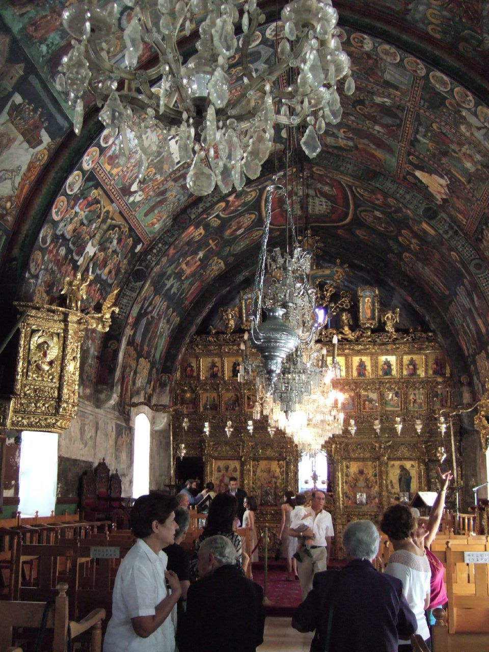 Nicosia, Ciproorthodox